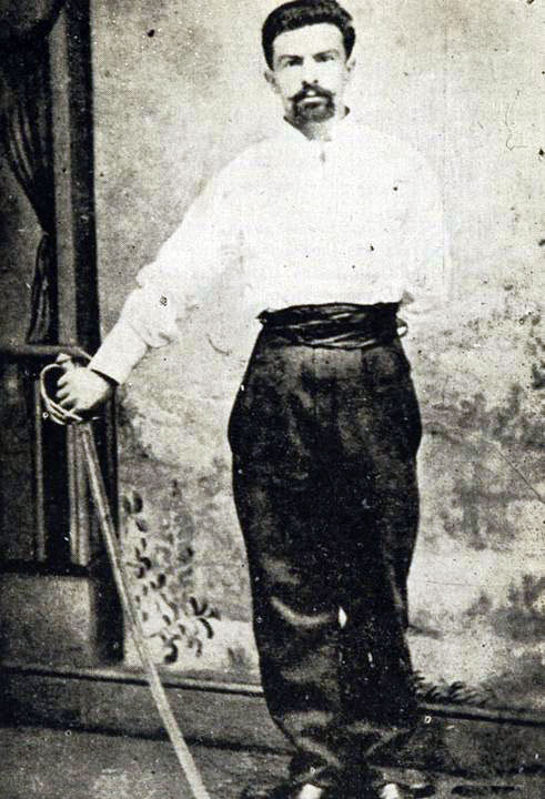 Hernán Trizano Avezzana, 1854-1926. Precursor del Cuerpo de Carabineros de Chile